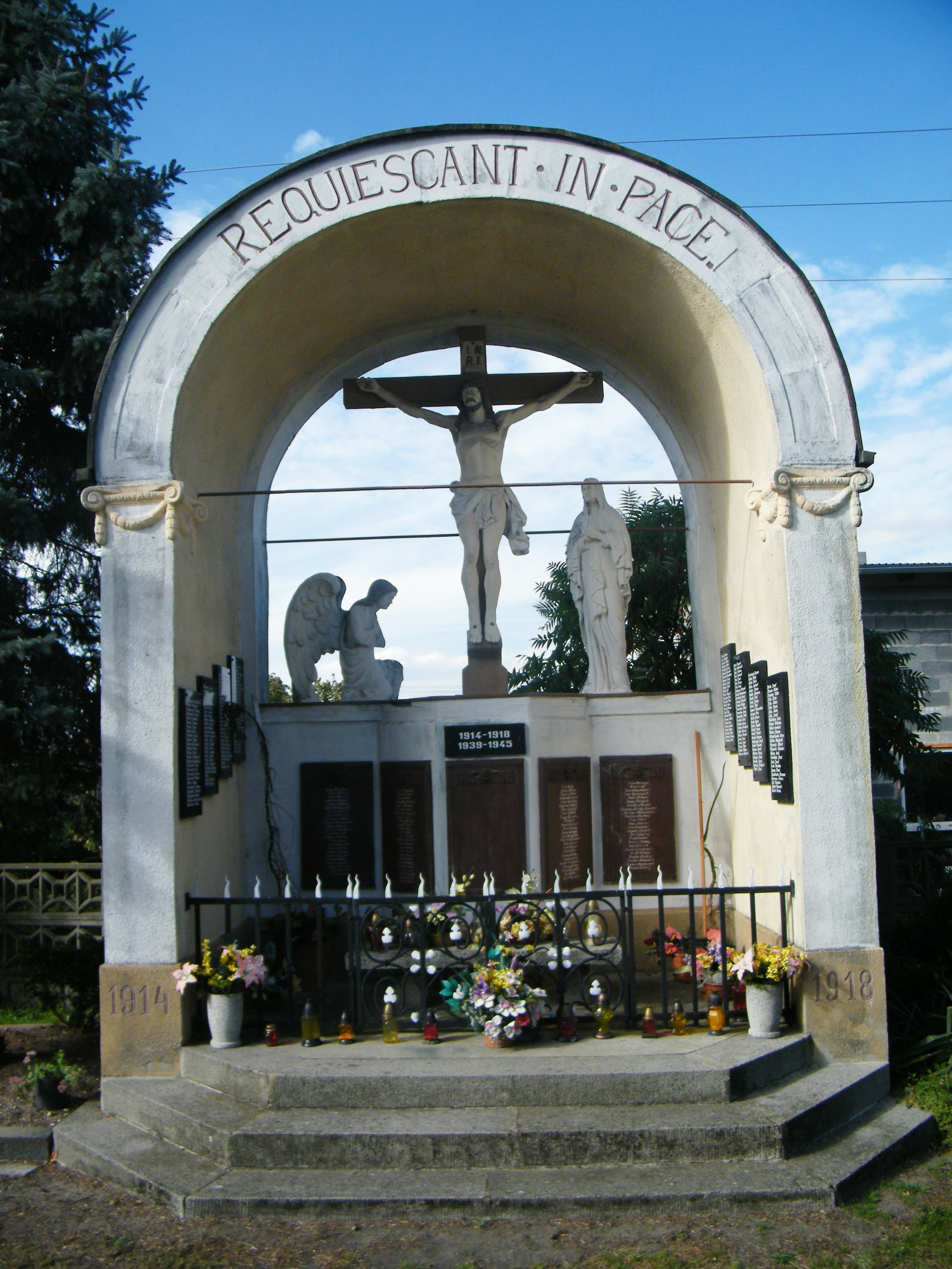 Kuniów - kościół parafialny p.w. św. Jana Chrzciciela, 1803, 1931-32 (zabytek nr 1059/65 z 26.06.1965)